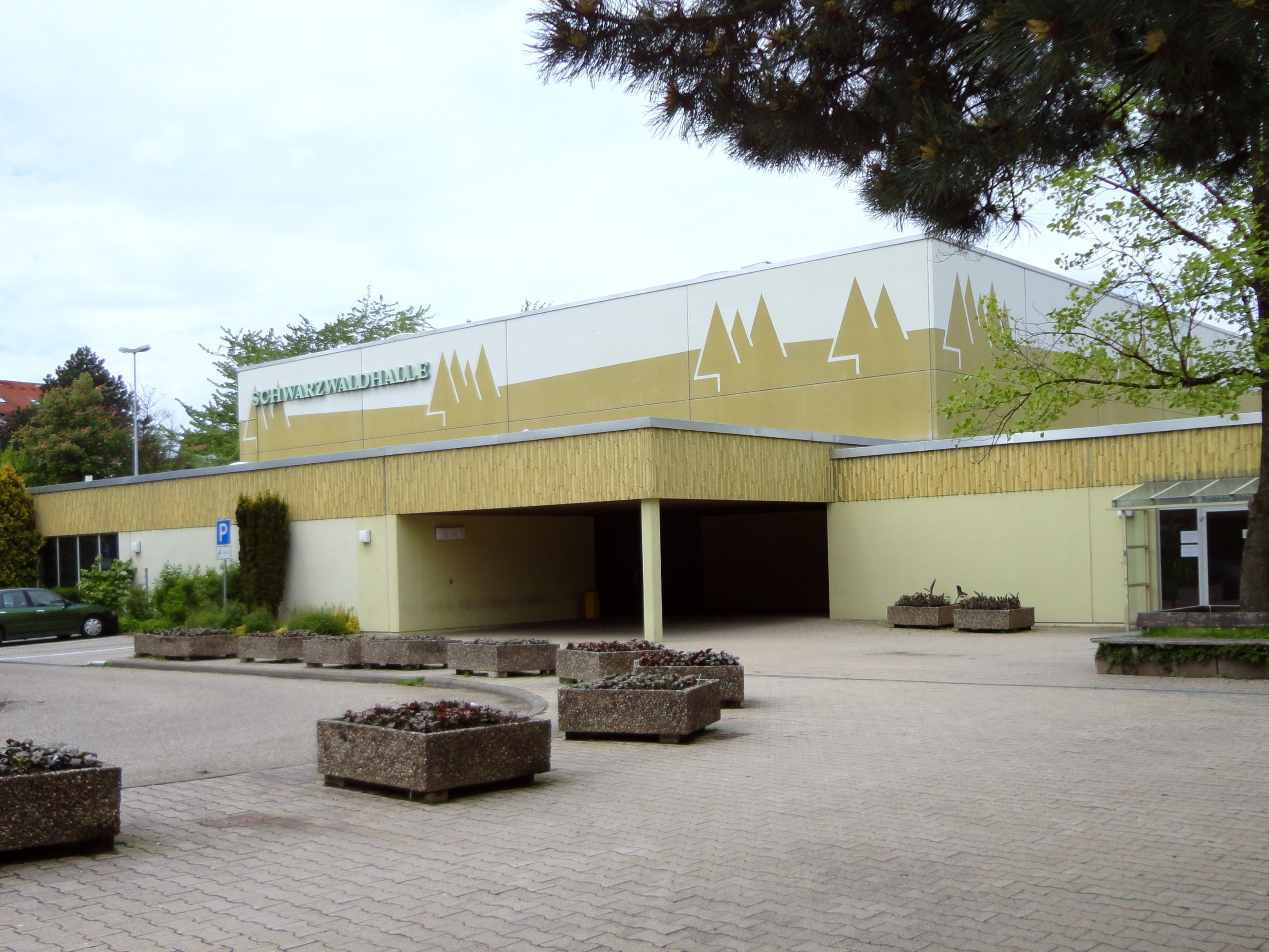 Schwarzwaldhalle in Birkenfeld (Württemberg)